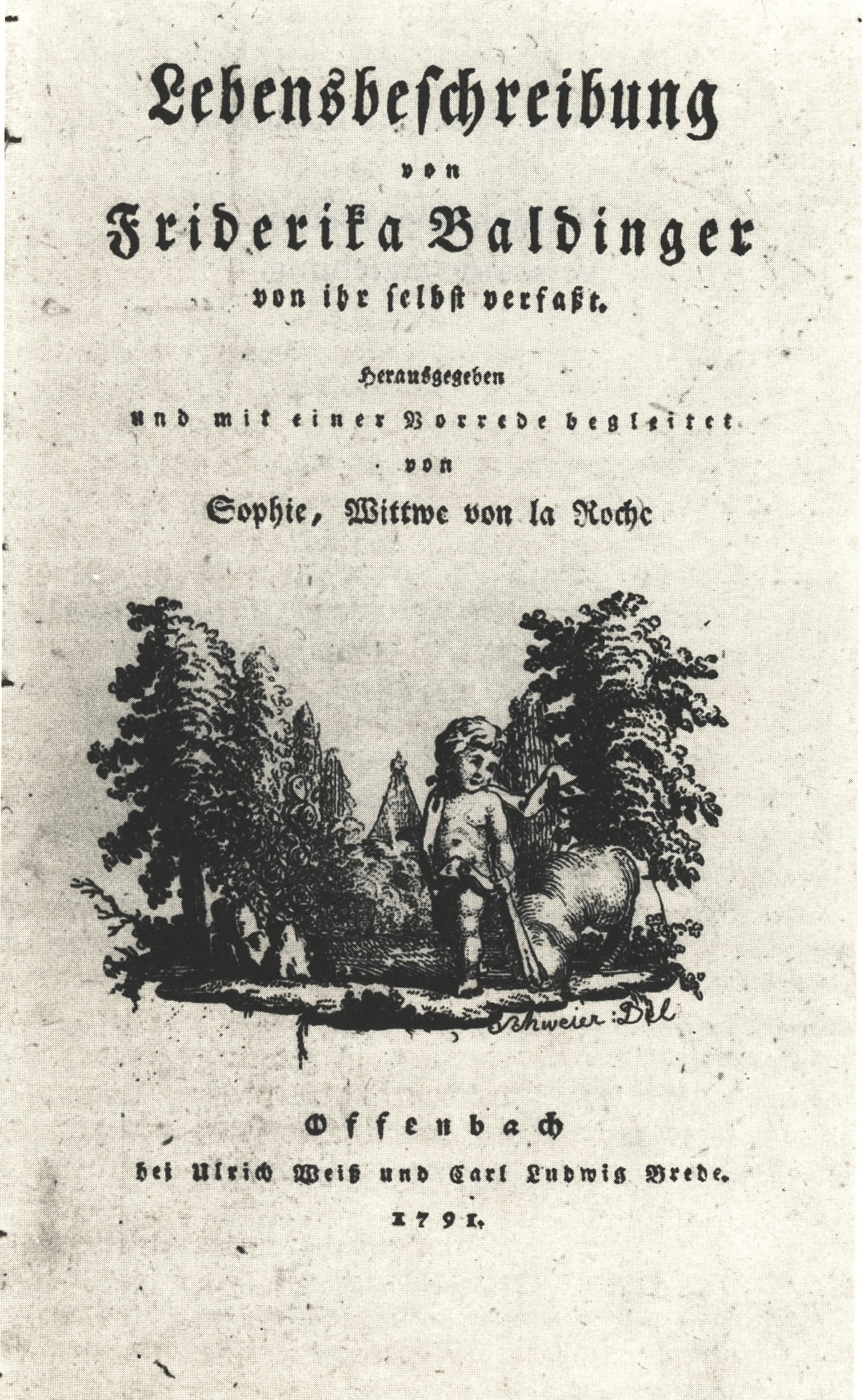 Cover des Buches "Lebensbeschreibung von Friderika Baldinger von ihr selbst verfaßt" aus dem Jahr 1791.